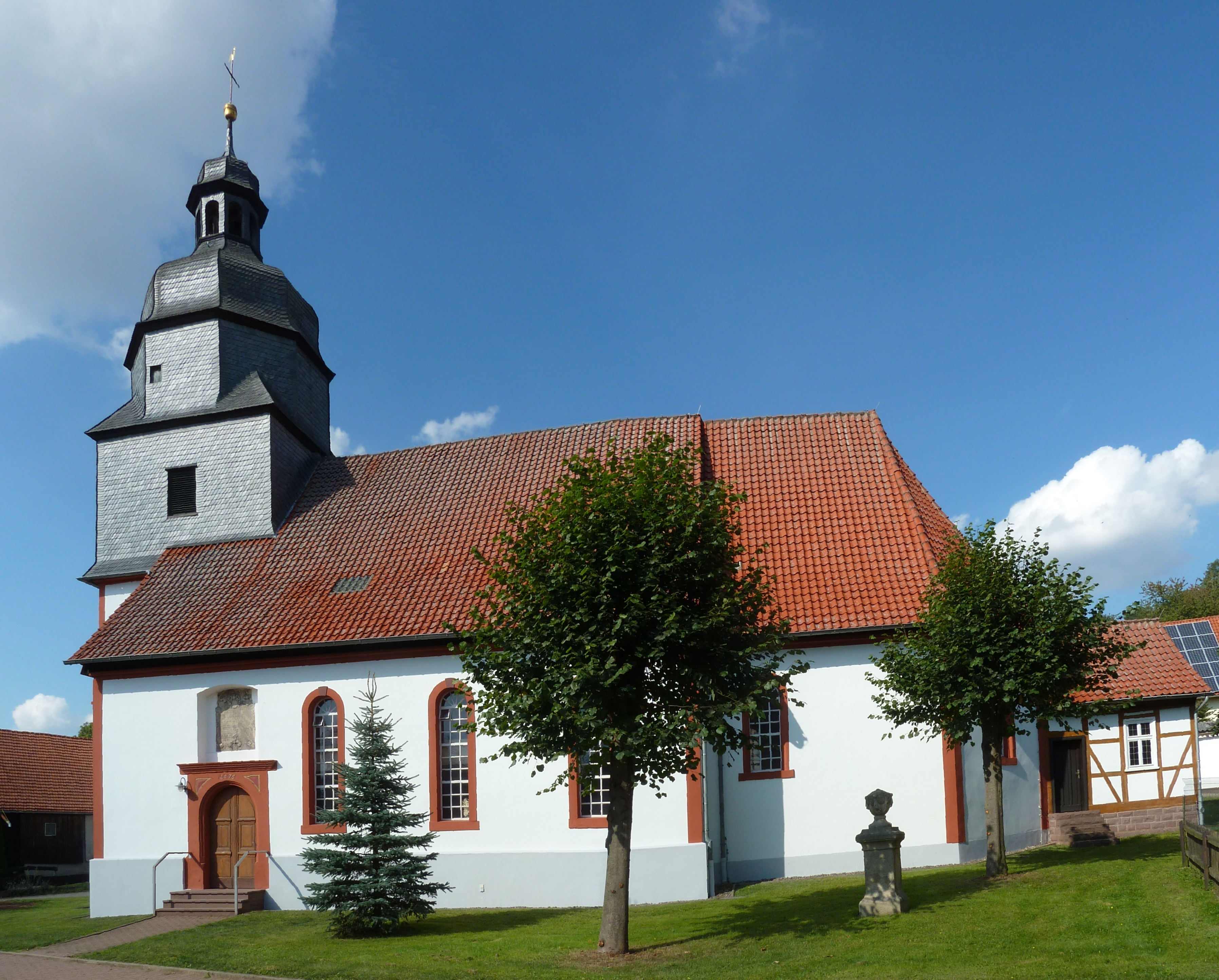 Seitenansicht der ev.-luth. Kirche St. Marien in Wollershausen, Niedersachsen. Erbaut 1675, Chorraum 1610/11